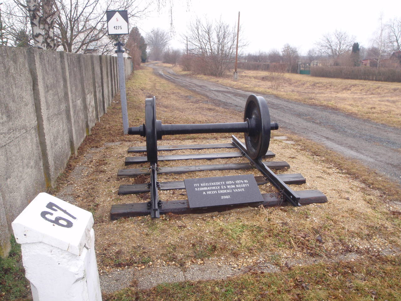 Vasúti emlékhely Táplánszentkereszt, Vasút utca. Állítva 2007-ben